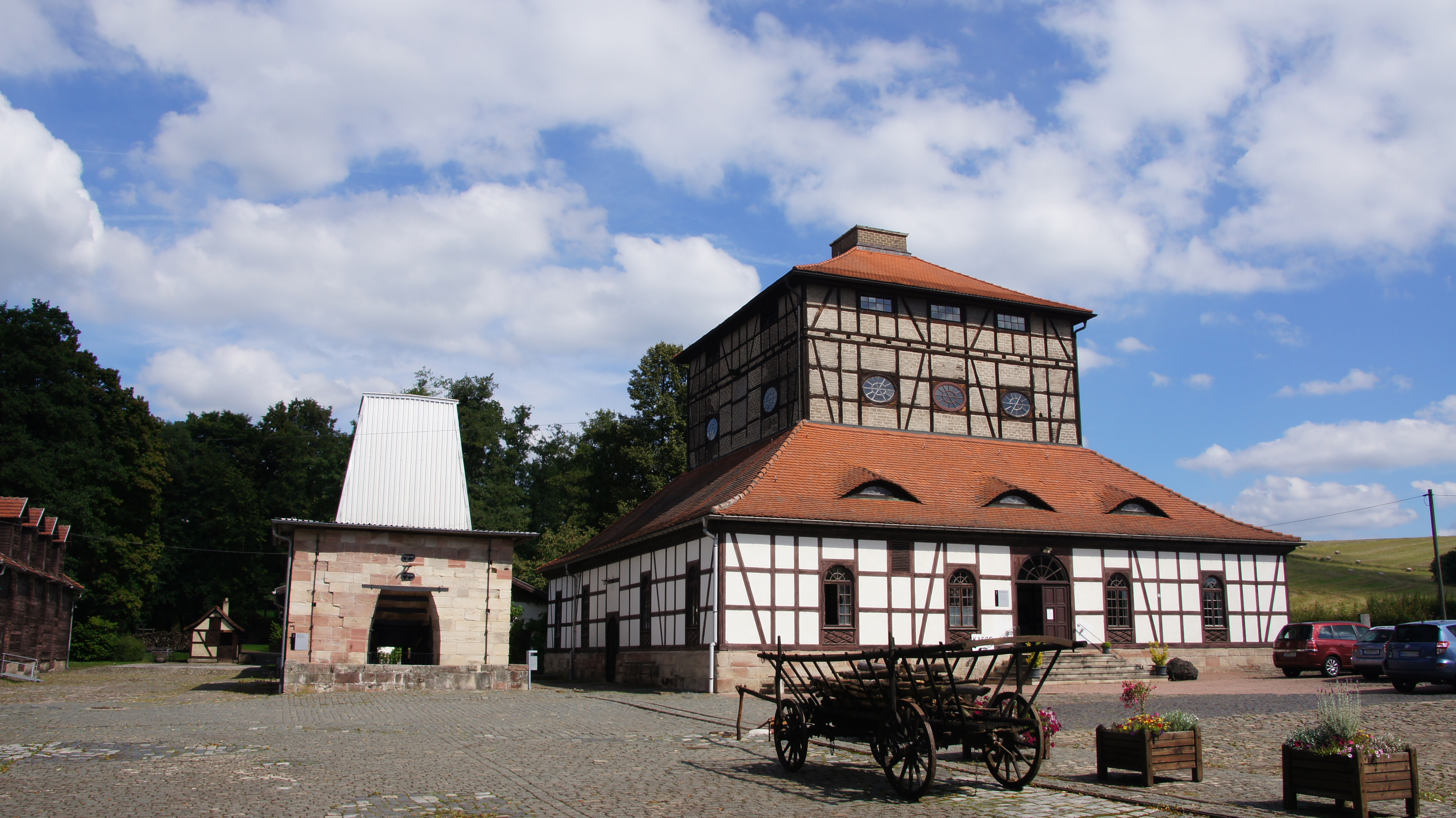 Neue Hütte - Schmalkalden - 20120902-17